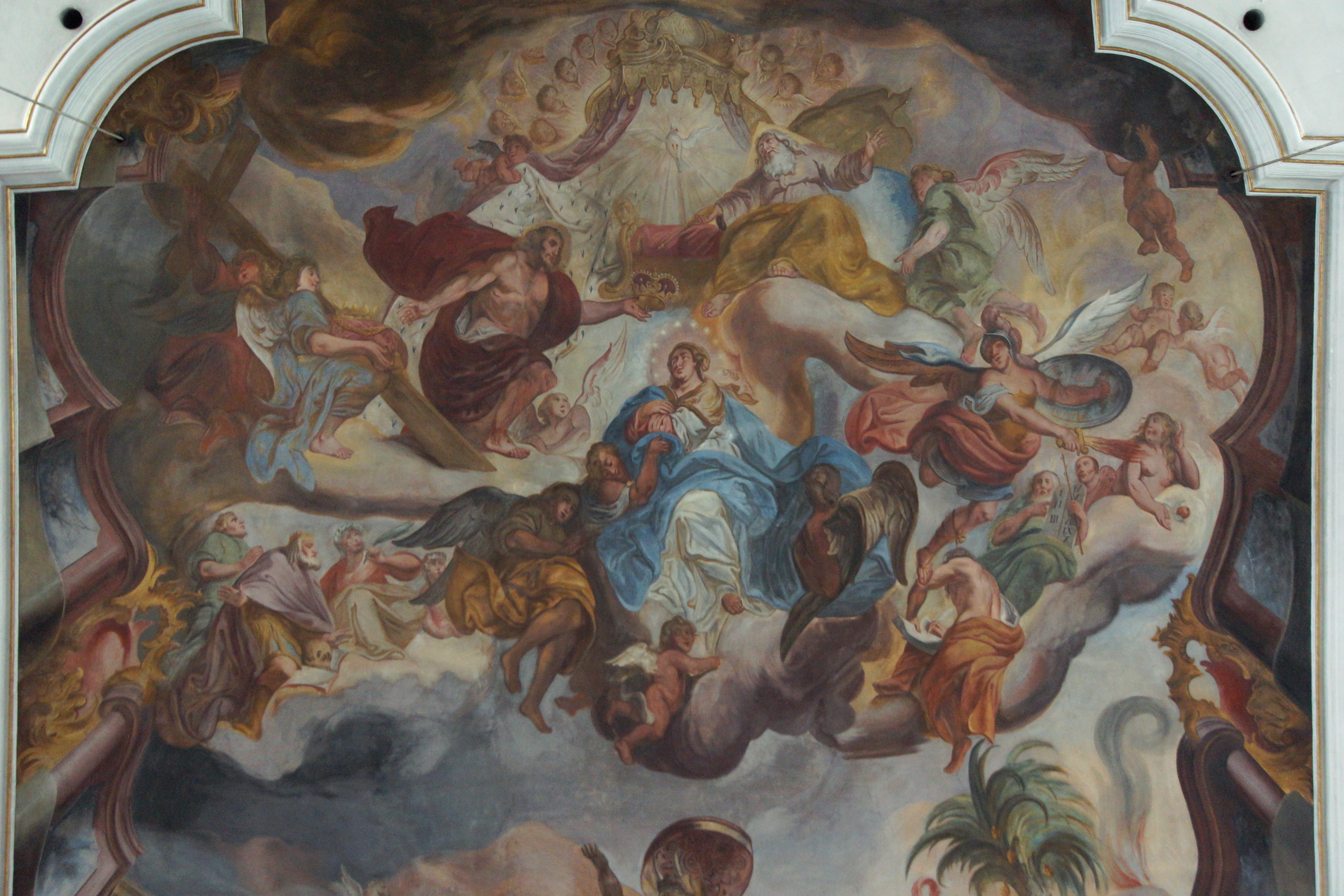 Die katholische Pfarrkirche Mariä Himmelfahrt in Berching in der Oberpfalz